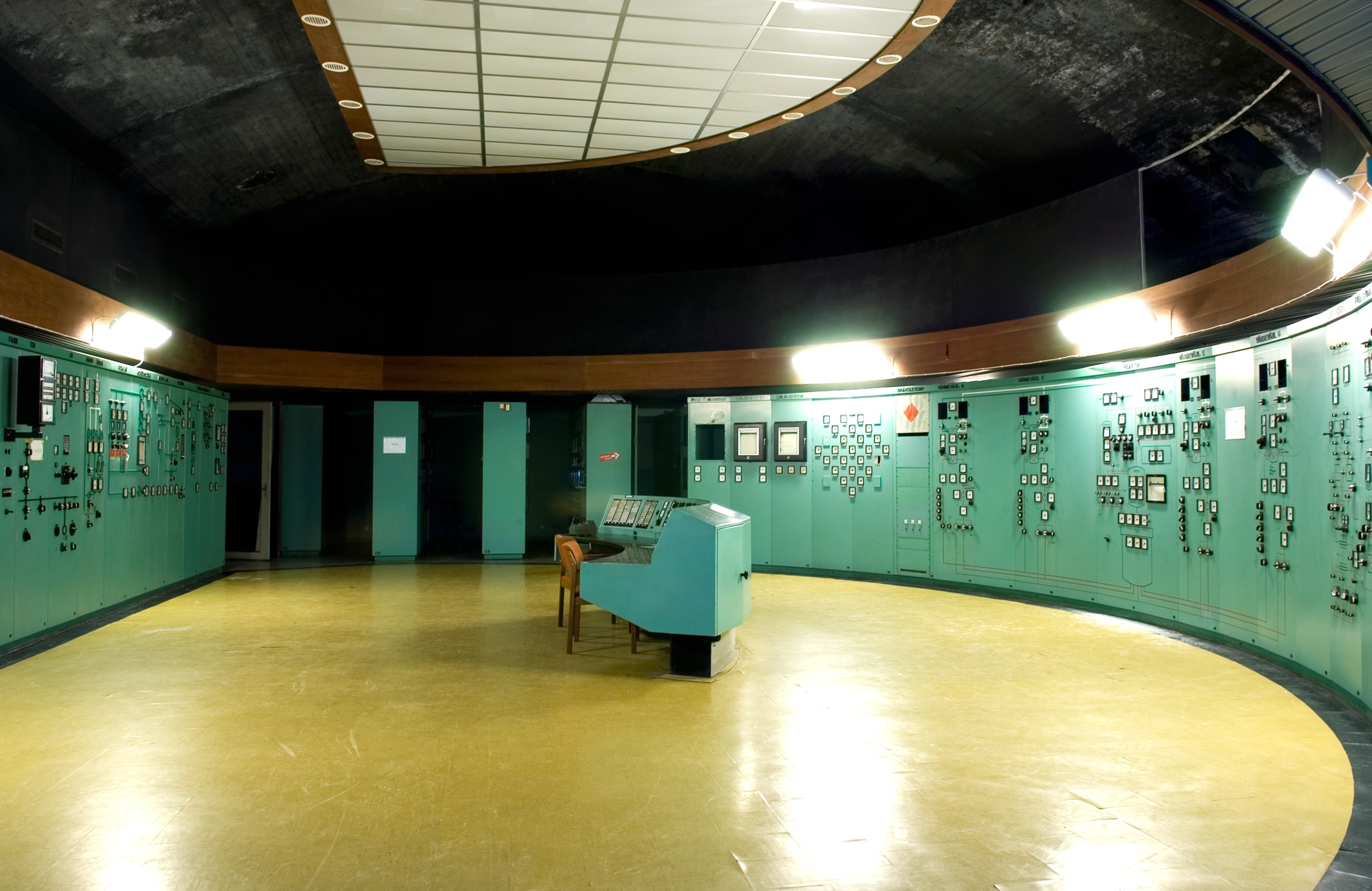 Ågesta kärnkraftverk. Under 2005 gjorde Tekniska museet tillsammans med Stockholms Läns Museum och Länsstyrelsen i Stockholms län en fotodokumentation av anläggningen.